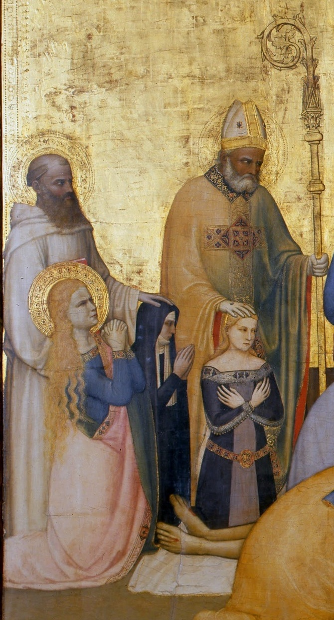 detail